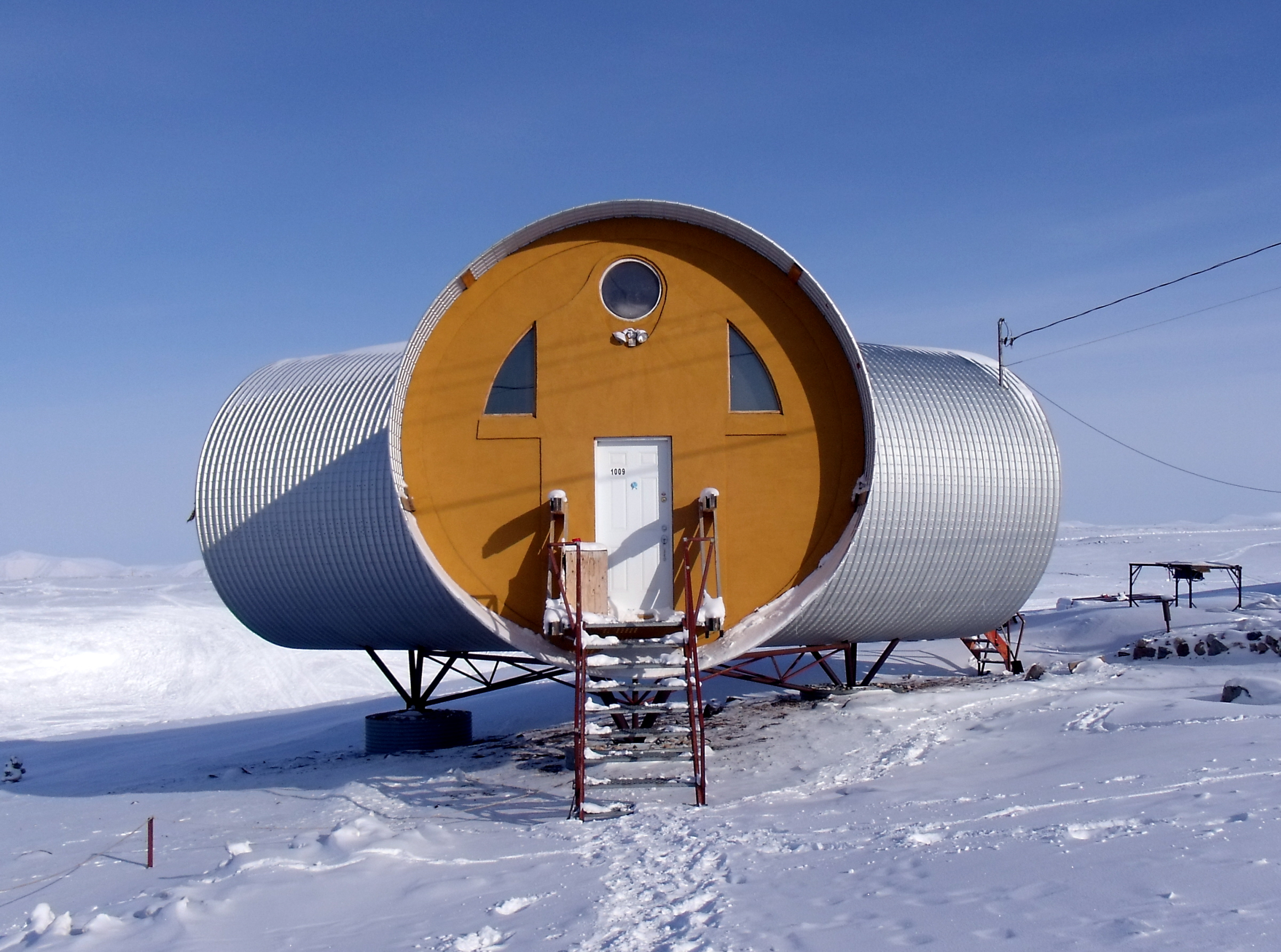 cool culvert cabin in Pond Inlet Nunavut